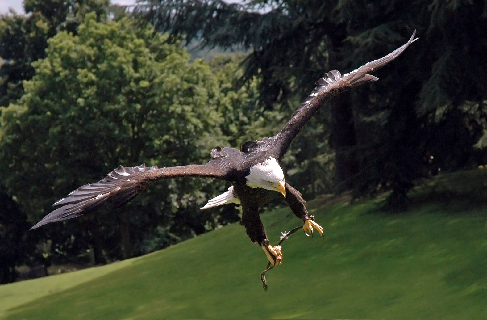 Bald Eagle